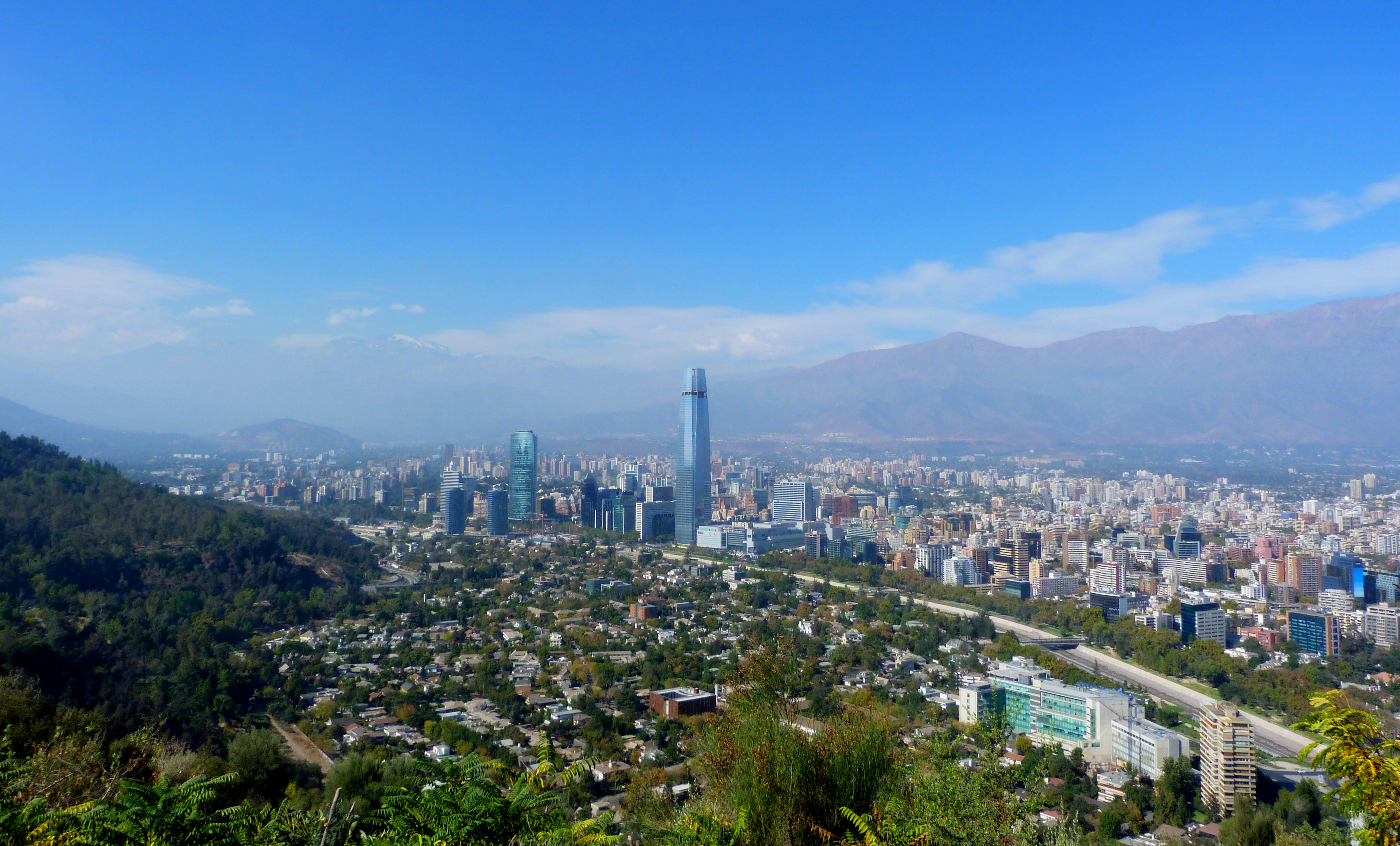 vista desde el cerro San Cristobal, Sanhattan.